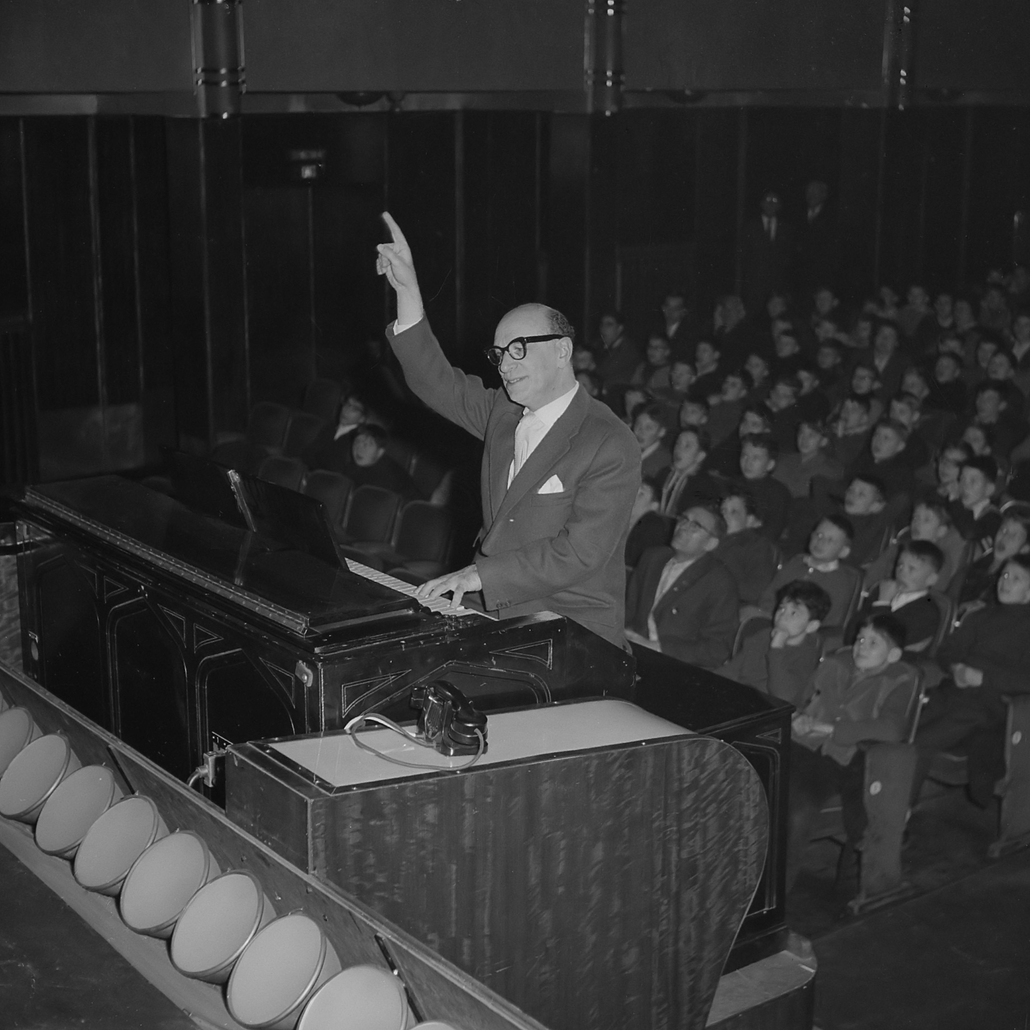 Bernard Drukker speelt voor het laatst in de Cinema Royal , Bernard Drukker tijdens het spelen 28 december 1960